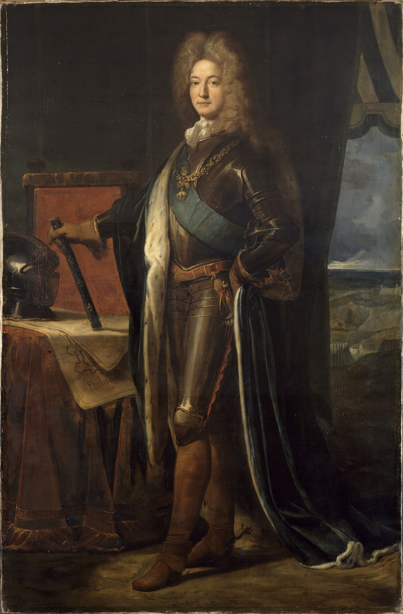 Portrait d'Adrien Maurice de Noailles (1678-1766), 3ème duc de Noailles